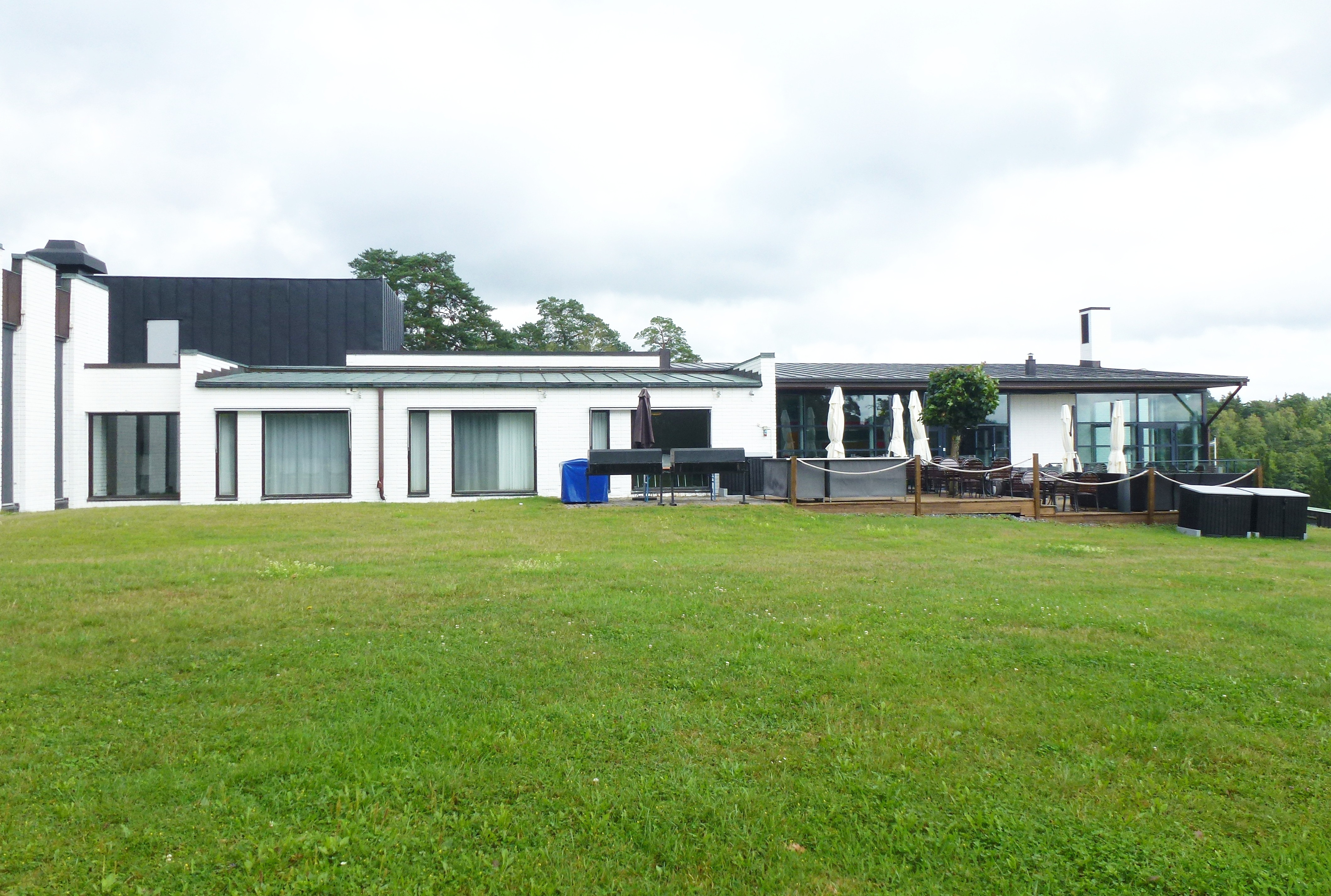 Bergendahl Meetings hotellet